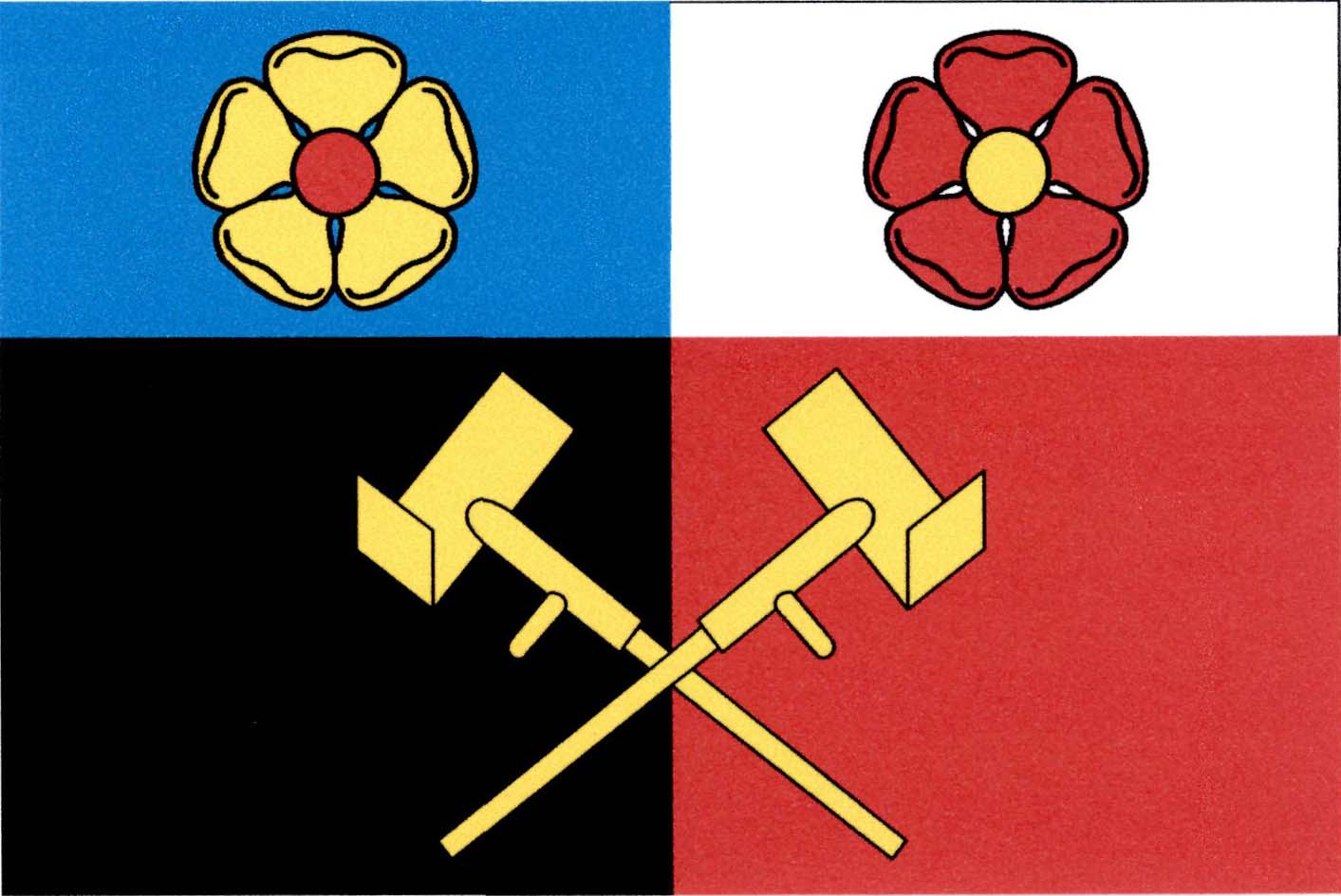 vlajka obce Borkovice